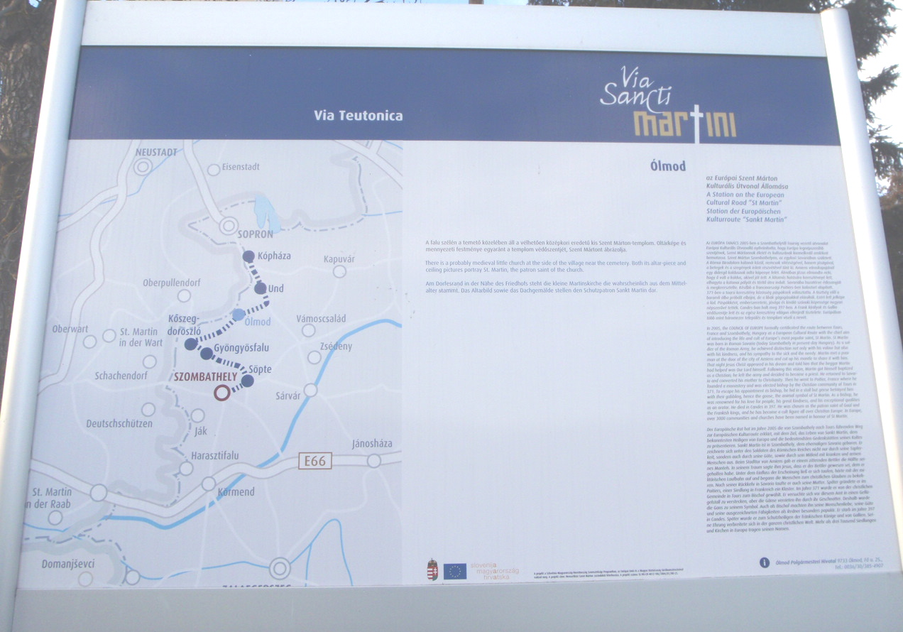 St Martin Gedenkstrasse, Ólmod